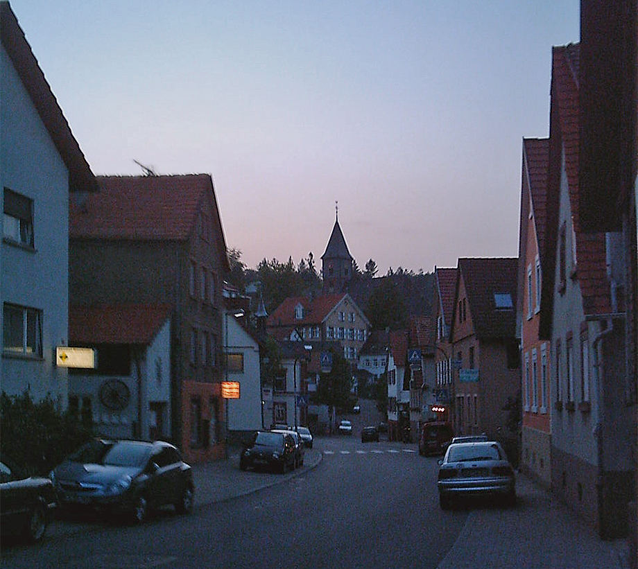 Grünwettersbach, Stadtteil von Karlsruhe (Baden). Ansicht Hauptstraße, mit Blick auf Kirchstaig. Im Hintergrund Alte Schule (Kirchstaig, Ecke Am Steinhäusle) und evangelische Kirche.